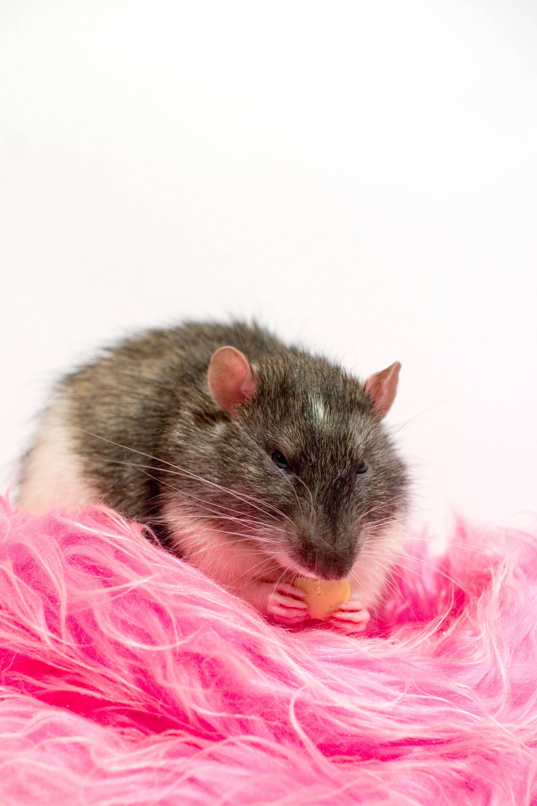 Star rat